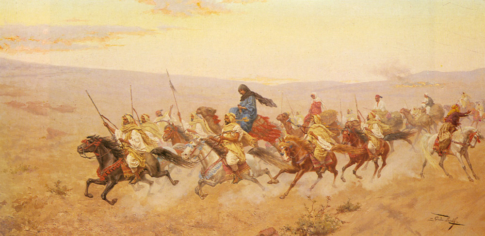 Une expédition couronnée de succès.